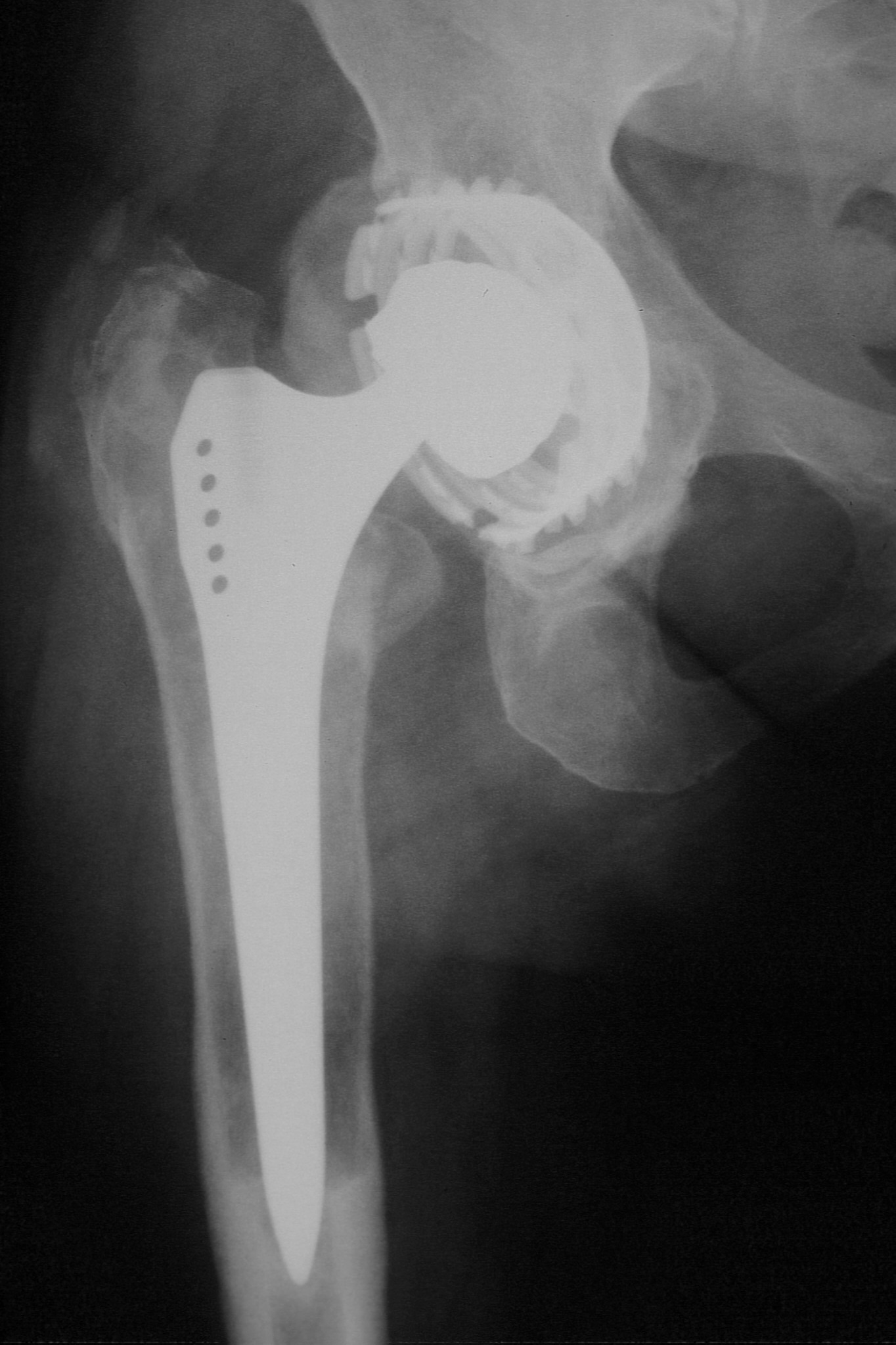 Röntgenbild eines rechten Hüftgelenks mit zementfreier Endoprothese (Rechteckschaft und konische Schraubpfanne): Konzentrische Einstellung des Metallkopfs im Polyethylen-Inlay der Pfanne. Ausgeprägte heterotope periartikuläre Verknöcherung und massive Osteolyse in der Umgebung des Prothesenschafts. Bei operativer Revision massive Metallose.